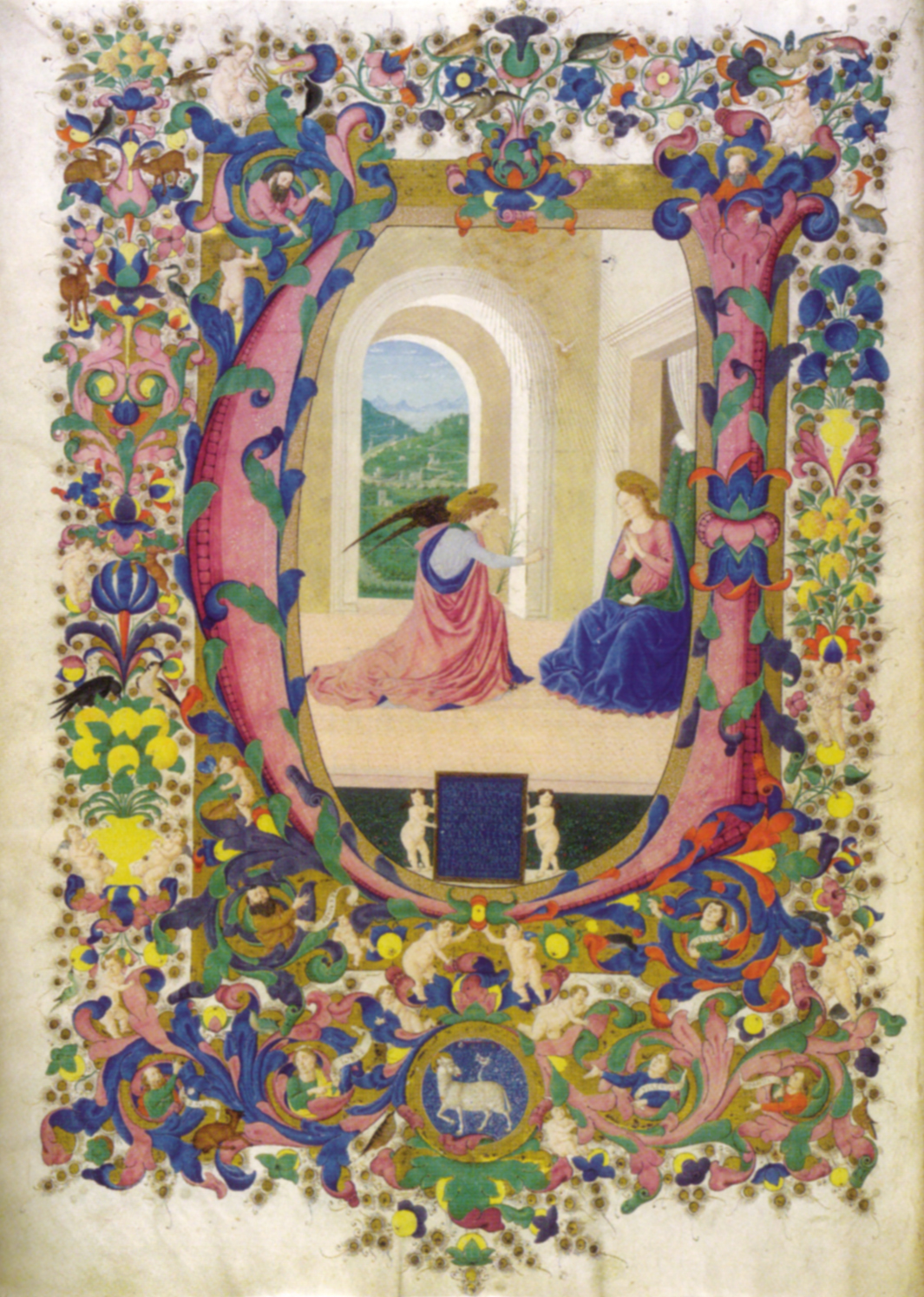 Francesco di antonio del chierico, annunciazione, graduale edili 151, f 1v., biblioteca medicea laurenziana